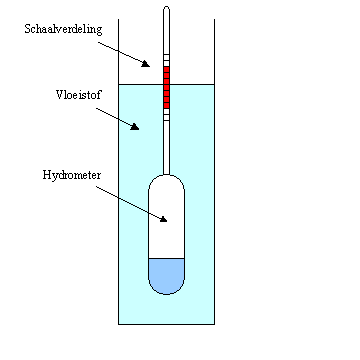 Hydrometer - eigen werk